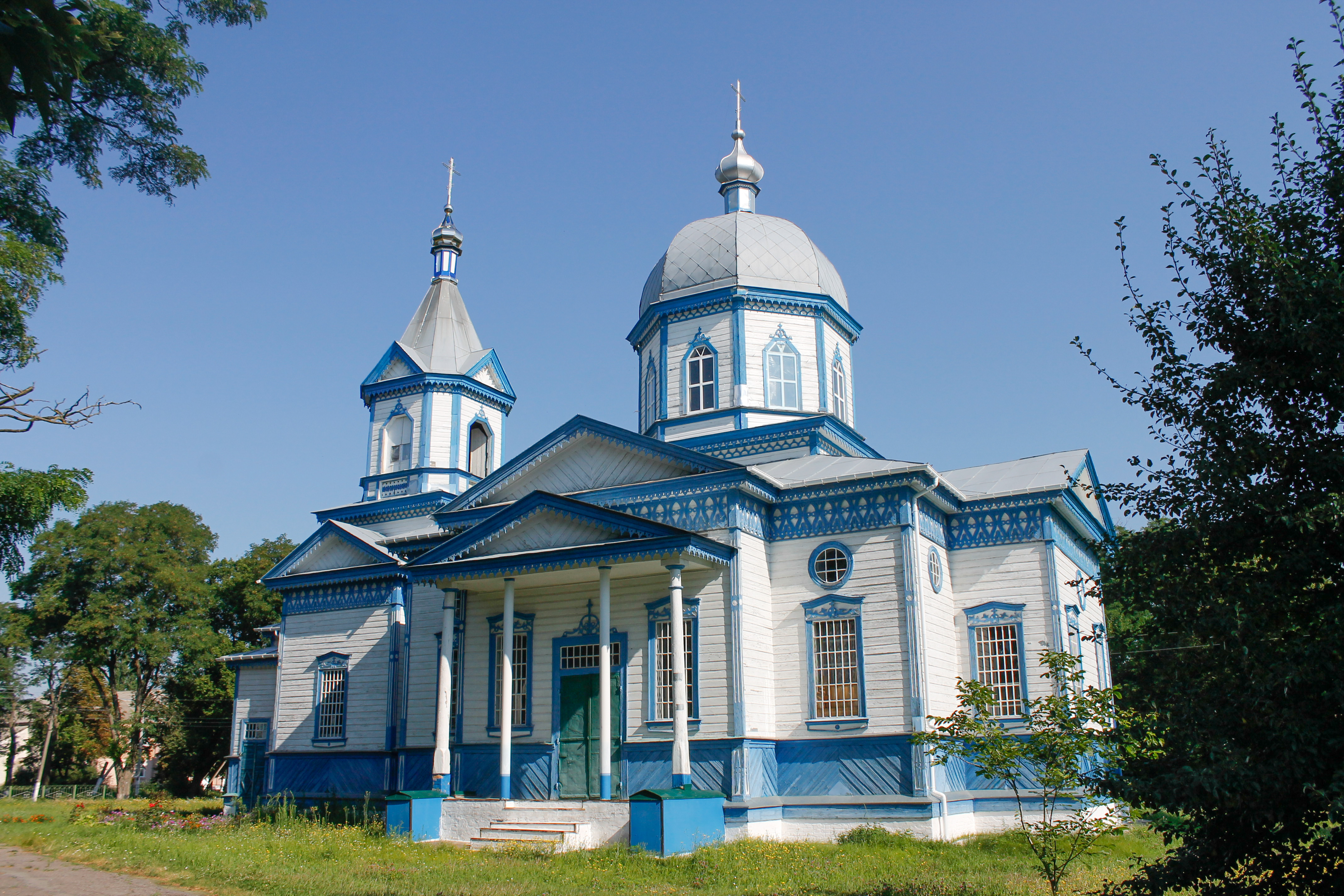 Церква Св. Миколи (Миколаївська церква) (дер.), с. Скориківка